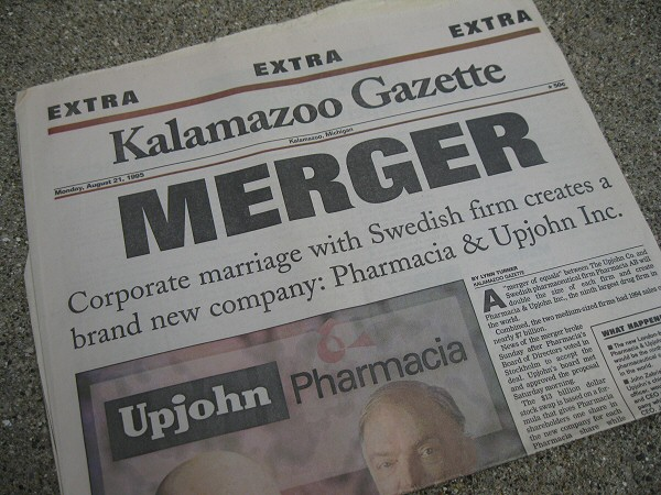 Quotidiano annuncia il merger Upjohn&Pharmacia